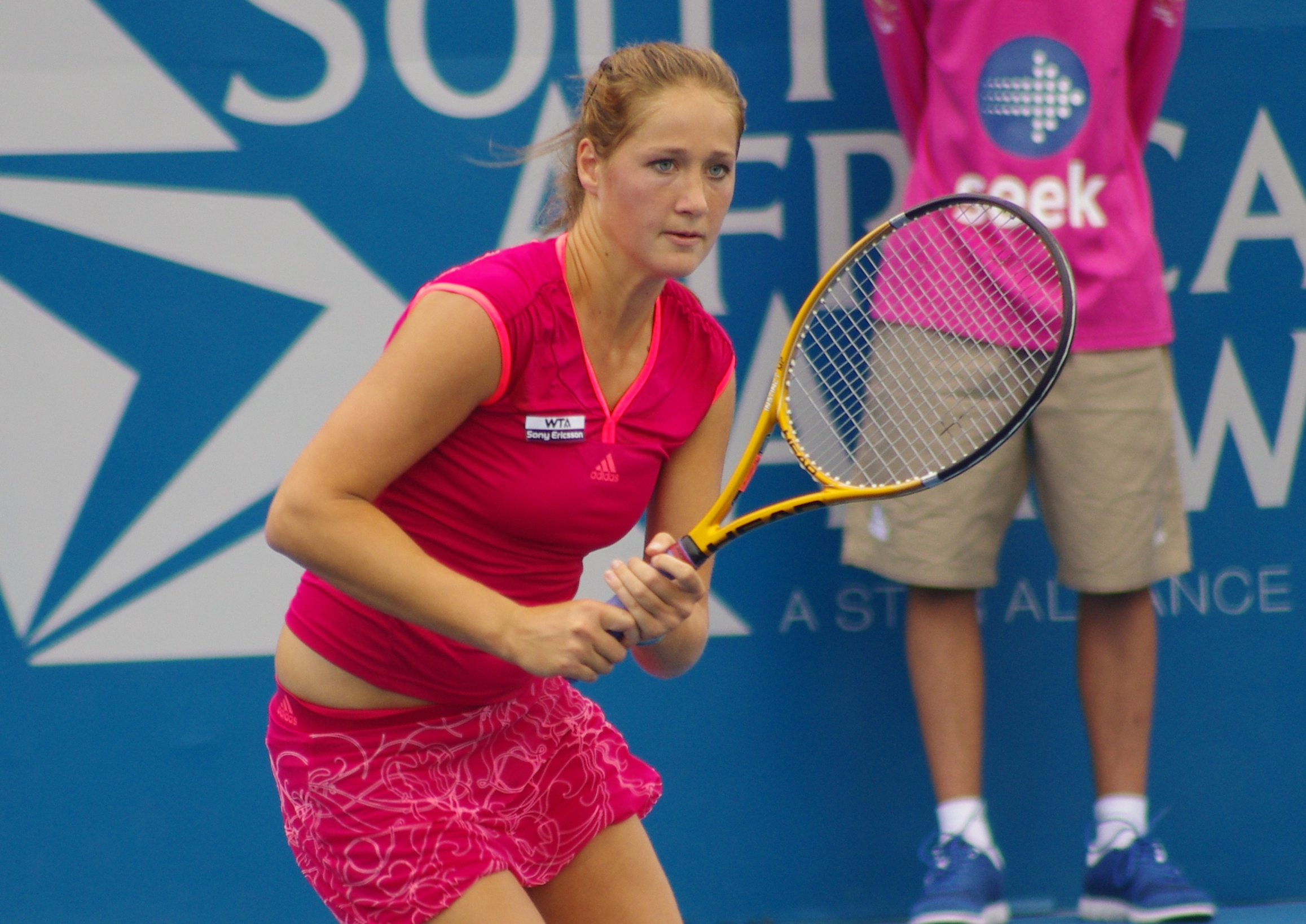 Bojana Jovanovski